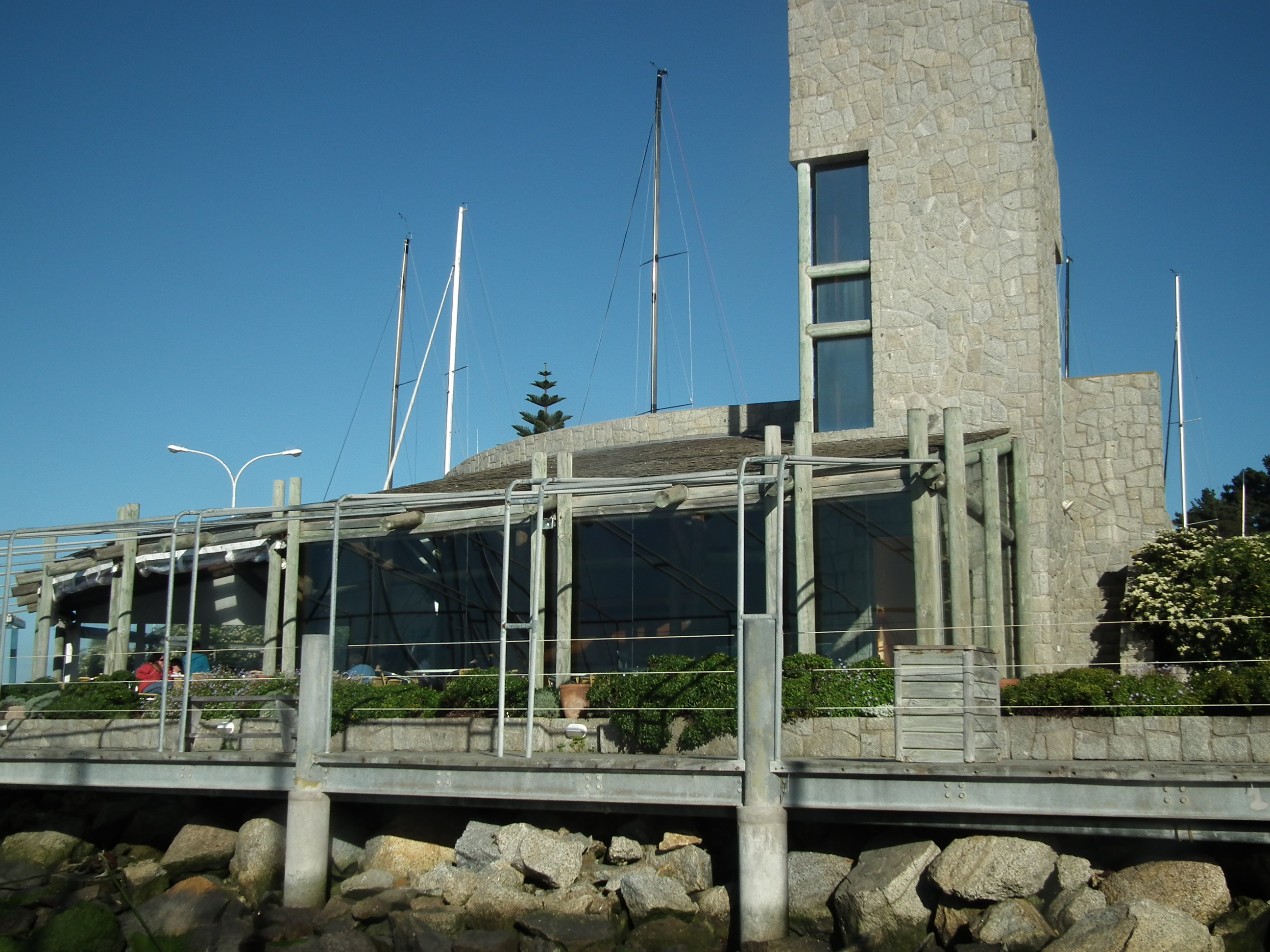 Una organización dedicada al deporte náutico y conocimientos del mar, basada en Algarrobo